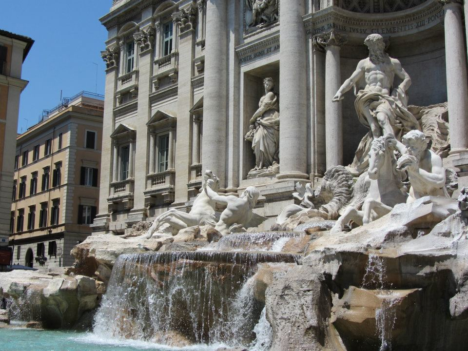 Fontana di Trevi